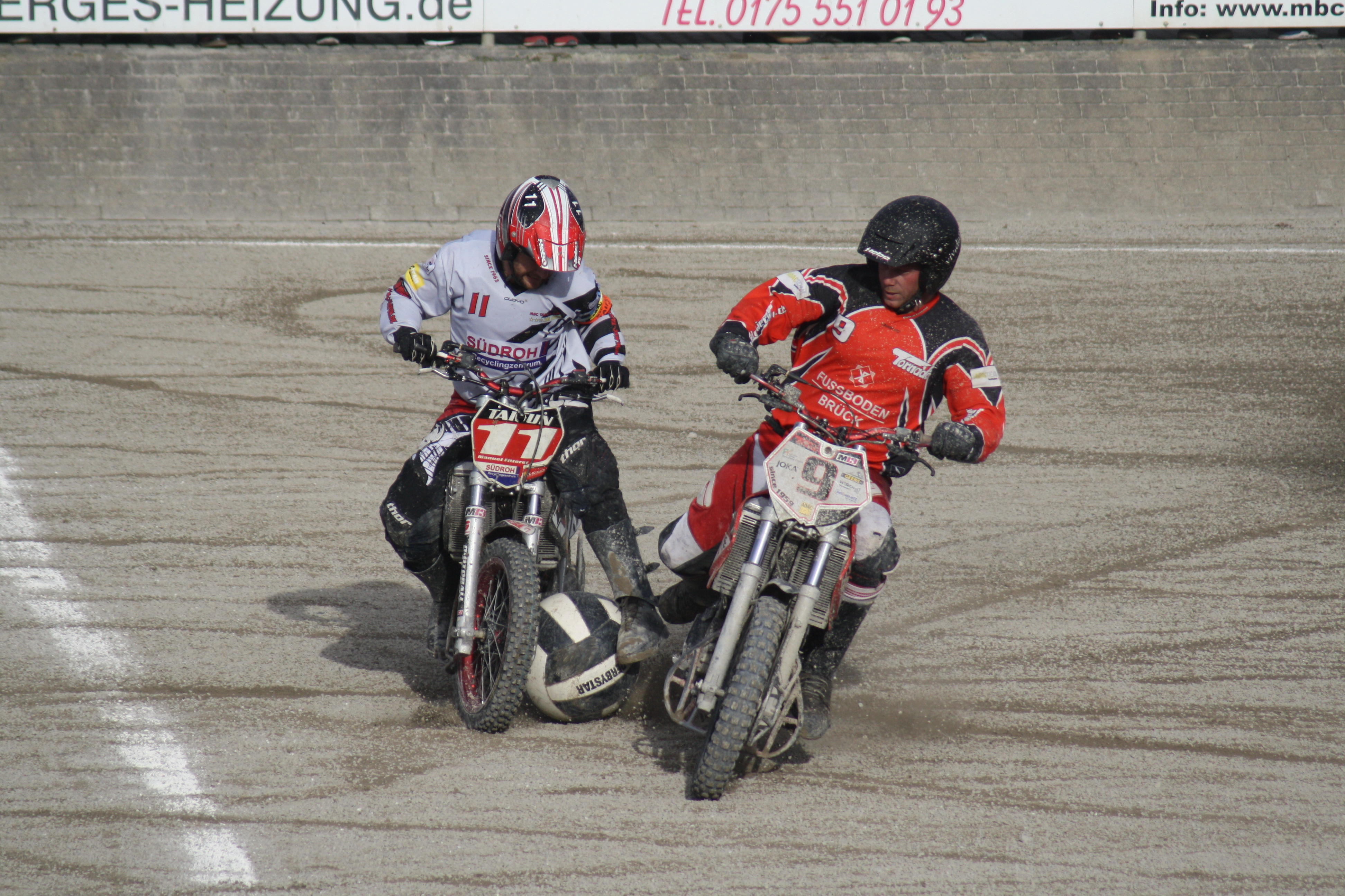 Ehemalige Nationalspieler unter sich: Pascal Loskand (Tornado Kierspe) im Zweikampf mit Manuel Fitterer (Taifun Mörsch) um den Motoball im DMM-Halbfinale 2014 in der Motoballarena Kierspe.